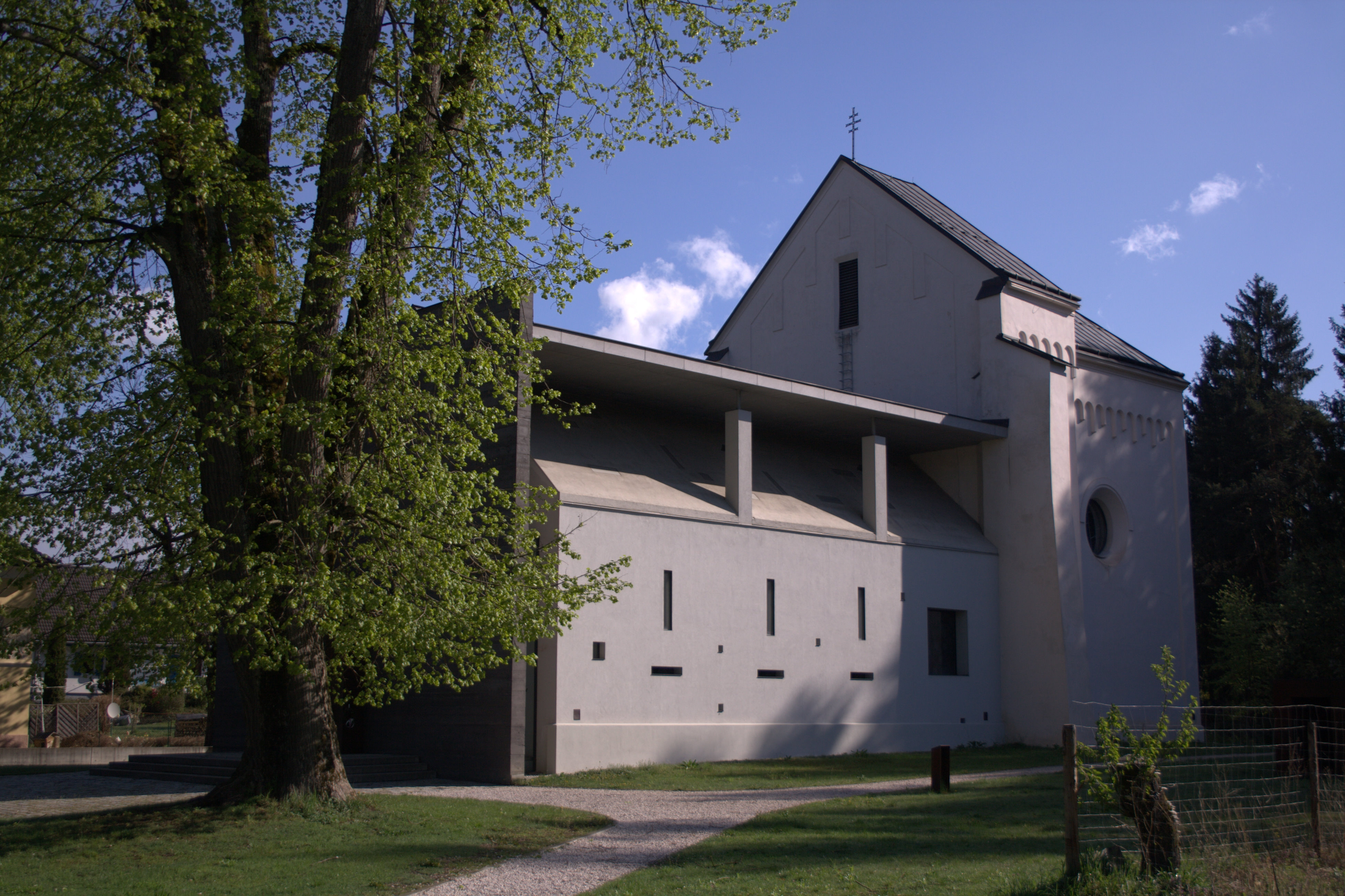 Autobahnkirche Dolina, Maria-im-Walde-Kirche Aussenansicht